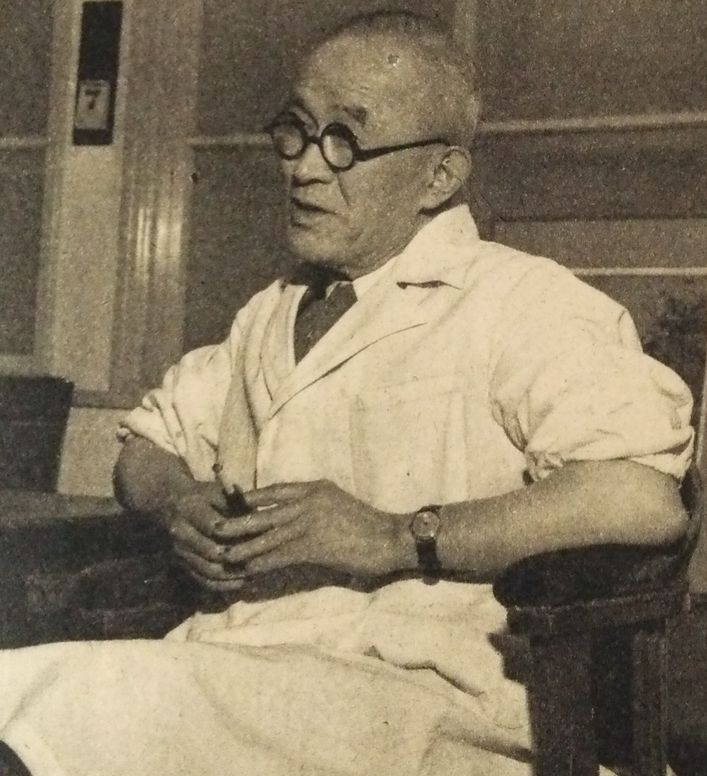 荻野久作